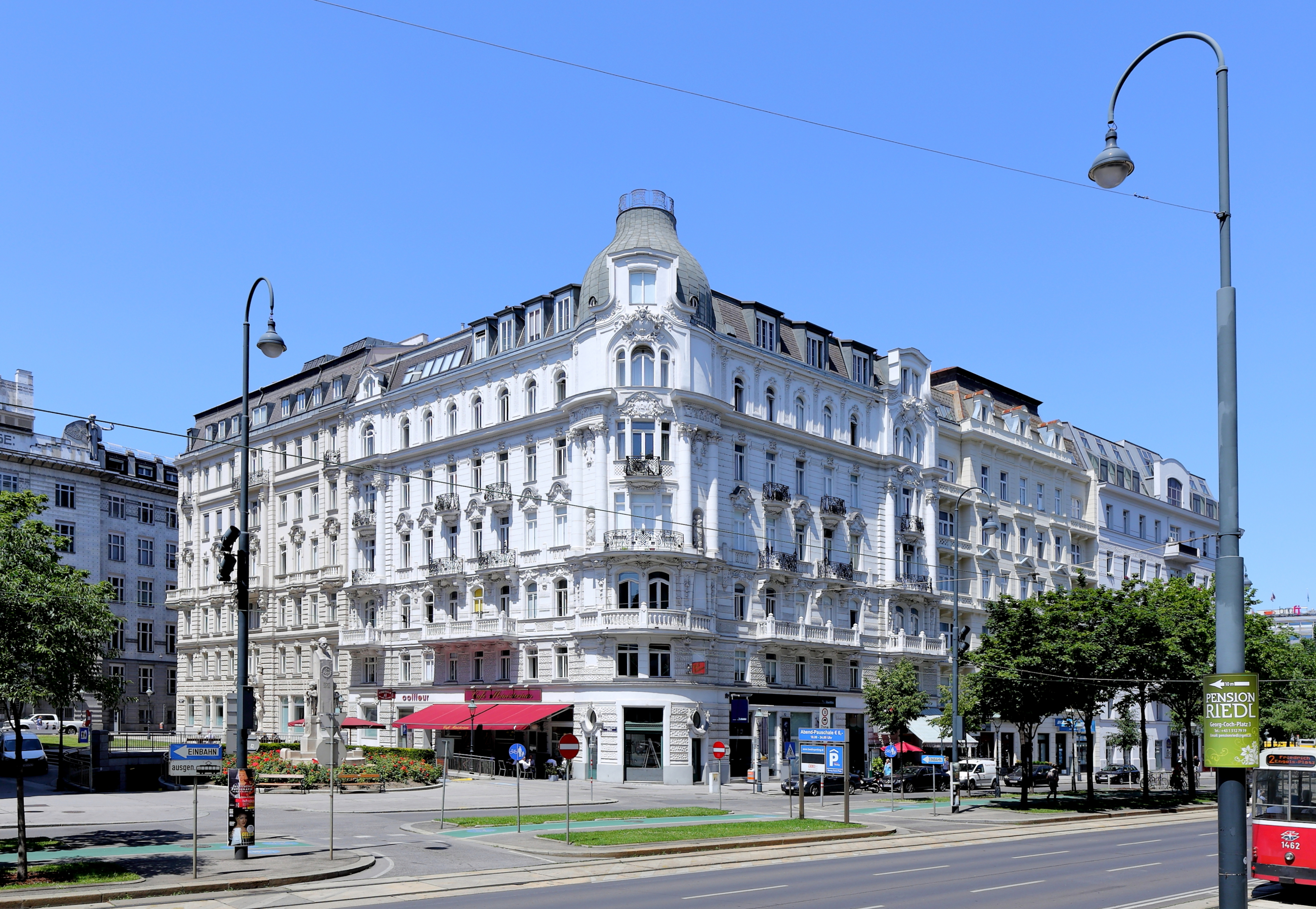 Wohn- und Geschäftshaus, Straßenecke Stubenring 6 und Georg-Coch-Platz 4, in der österreichischen Bundeshauptstadt Wien. Das späthistoristische Eckhaus mit neobarocken Formen wurde nach Plänen des Architekten Leopold Fuchs 1905 errichtet. Links davon das Georg-Coch-Denkmal zu Ehren des Gründers der Österreichischen Postsparkasse (am 28.5.1913 enthüllt).